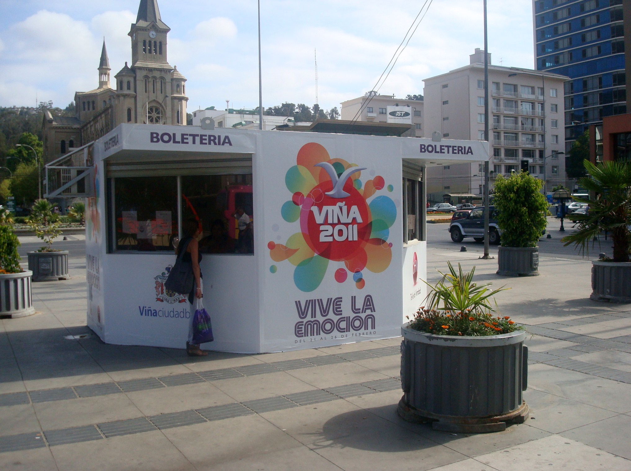 Boletería Festival Viña 2011, Viña del Mar, Chile